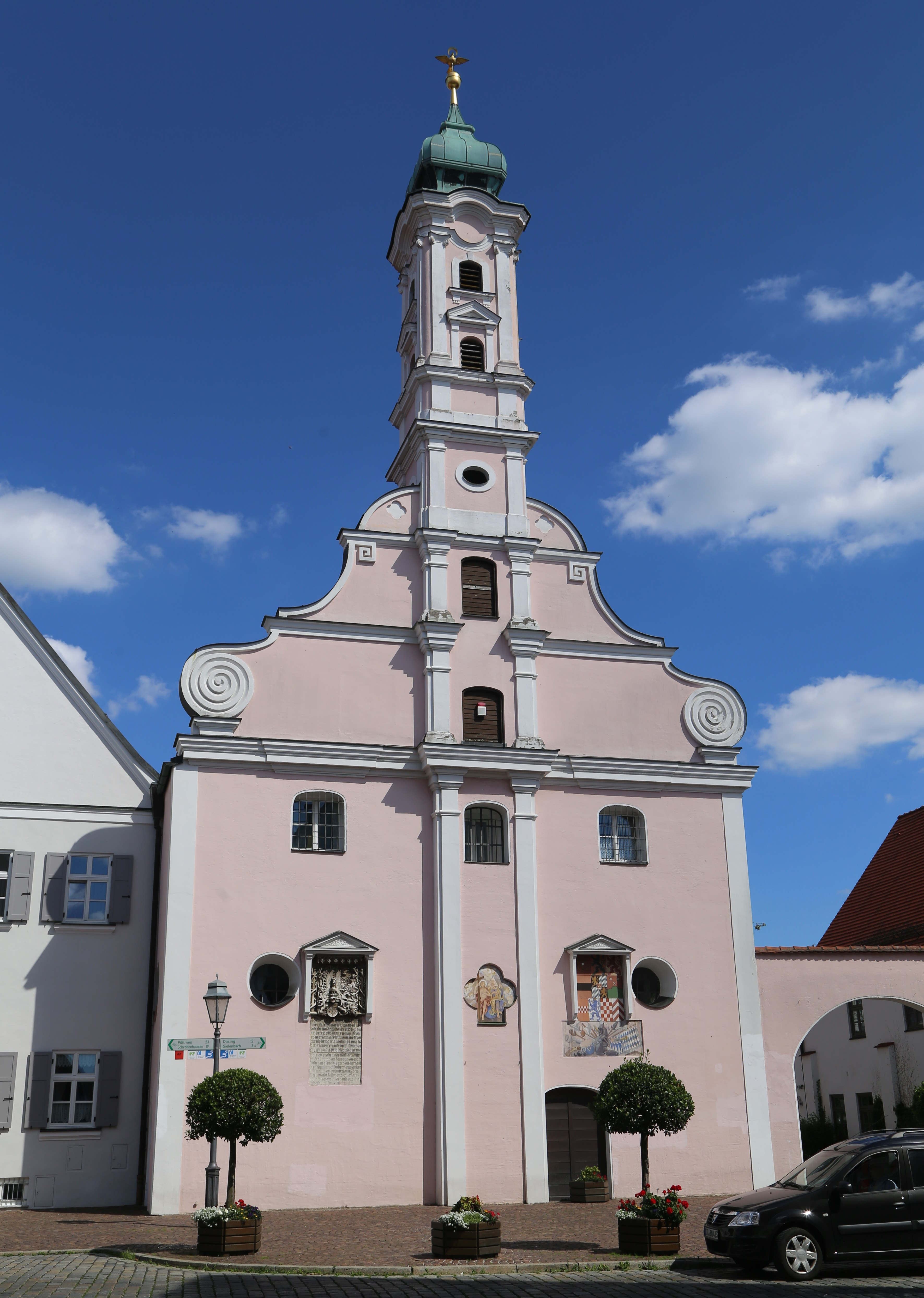 Stadtplatz 37, Aichach; Katholische Spitalkirche Heiliger Geist, zweischiffige Hallenkirche, Fassade mit Volutengiebel und reich gegliedertem Turm, im 15. Jahrhundert, 1642/43 wiederhergestellt, Turm 1734 und 1789; mit Ausstattung; Torbogen